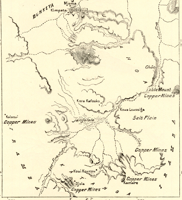 map of katanga mines around 1890